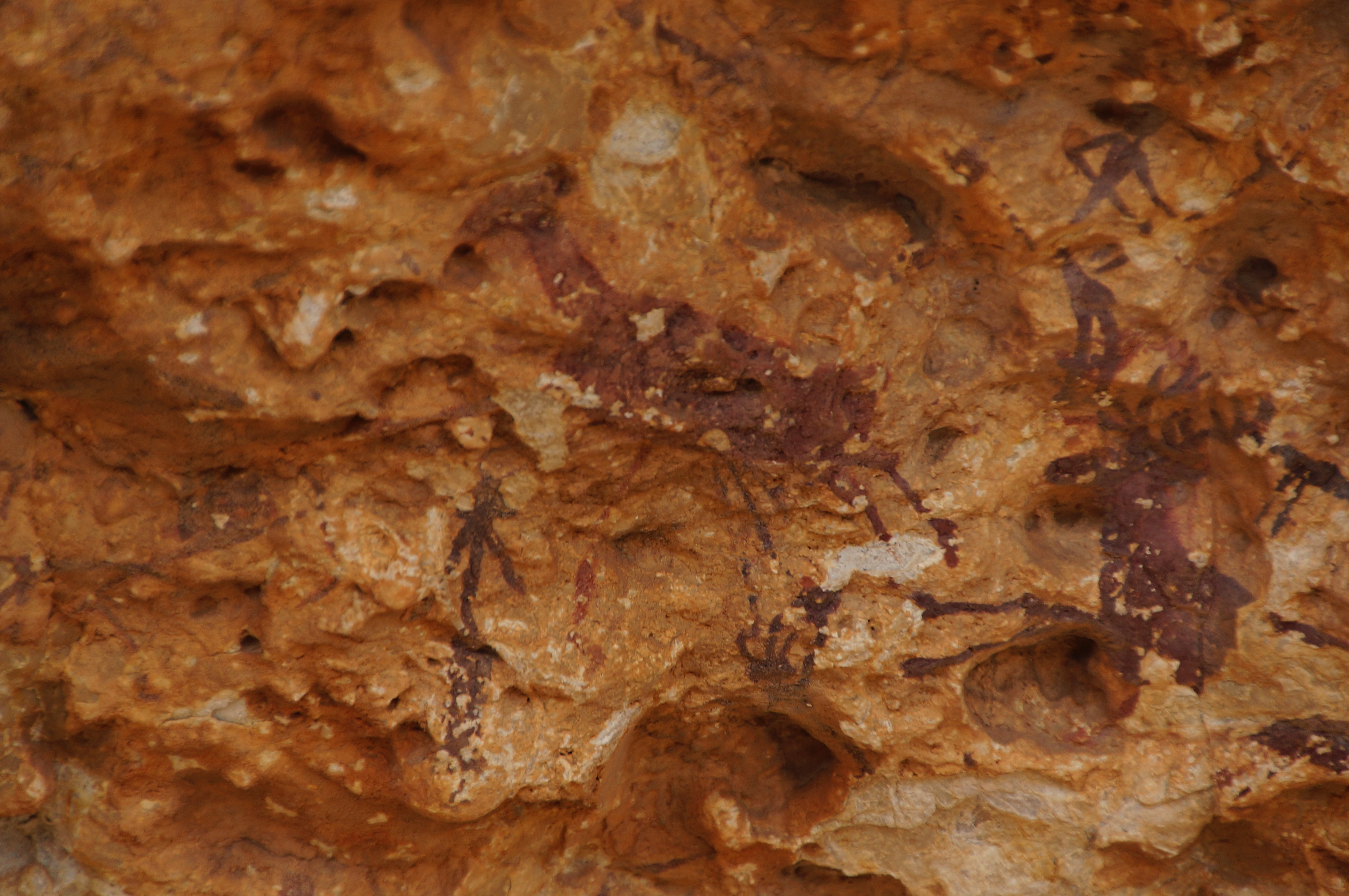 Abrics d'Ermites I (Ulldecona)